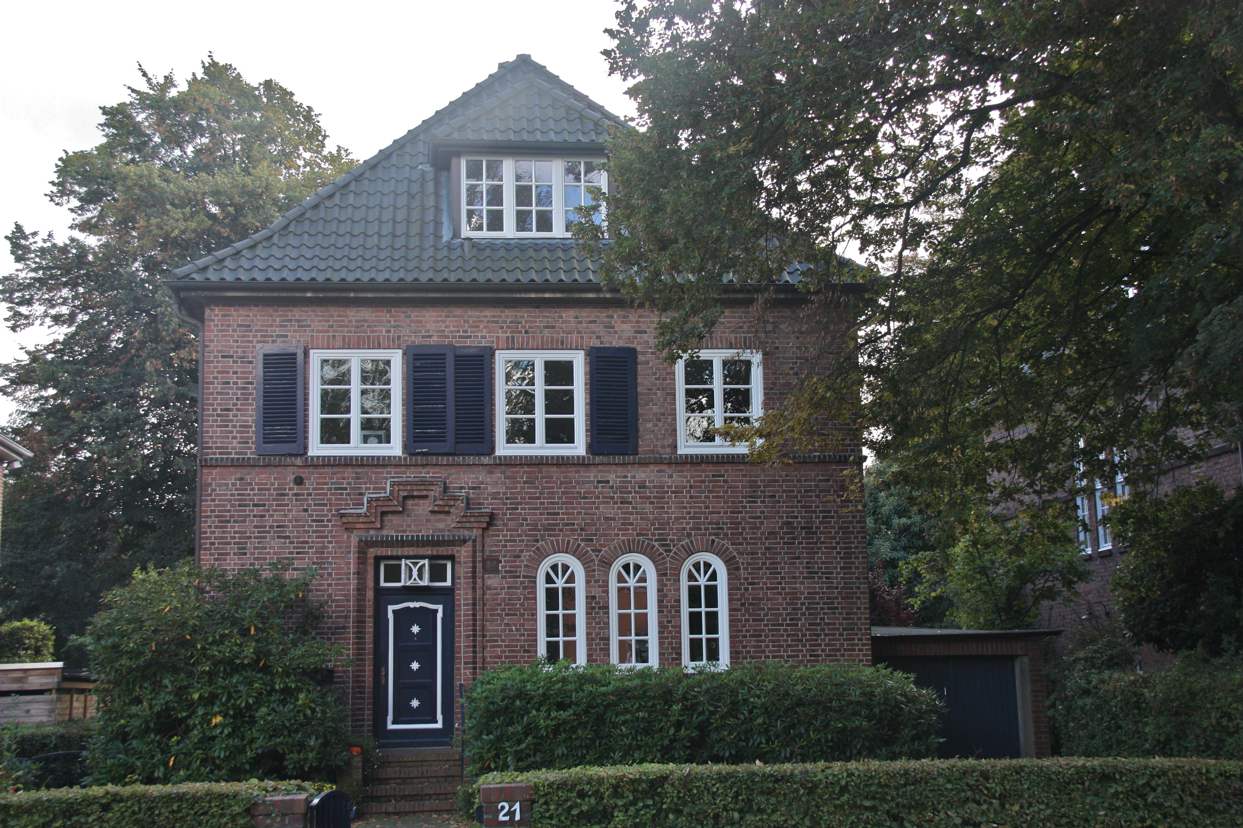 Hamburg, Groß Flottbek, Cranachstr 21This is a photograph of an architectural monument.